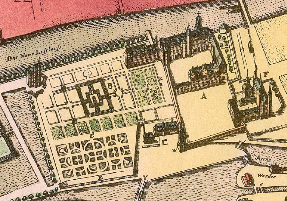 Ansicht des in Berlin-Cölln gelegenen Kurfürstlichen Schlossgartens (Lustgarten)